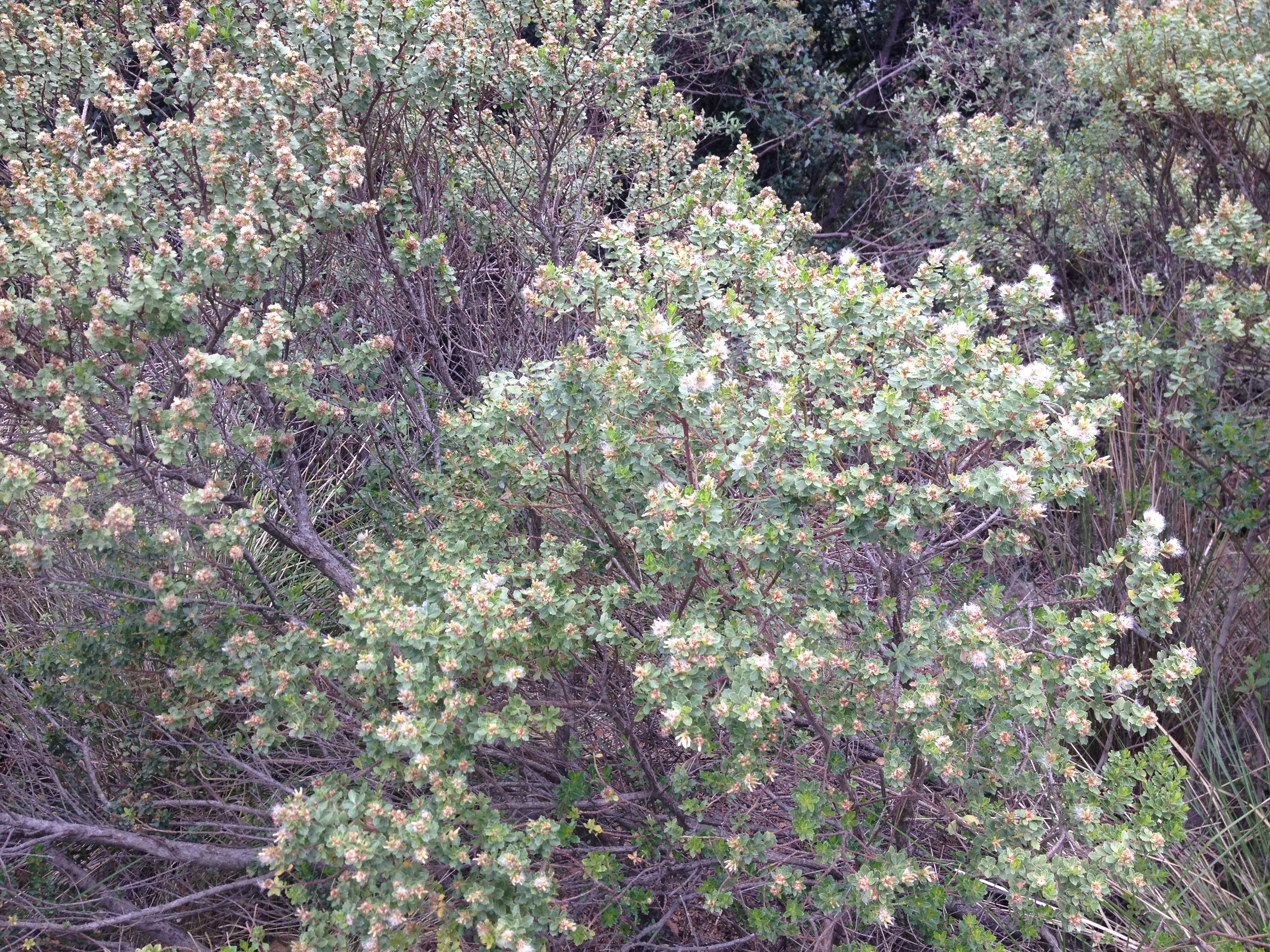 Baccharis conferta en flor en el cerro El Tintero (Acajete, Pue., México).